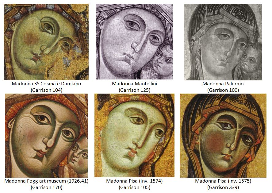 les 5 madones attribuées à M. SS Cosma e Diamano par Garrison 1949 (et la 339)